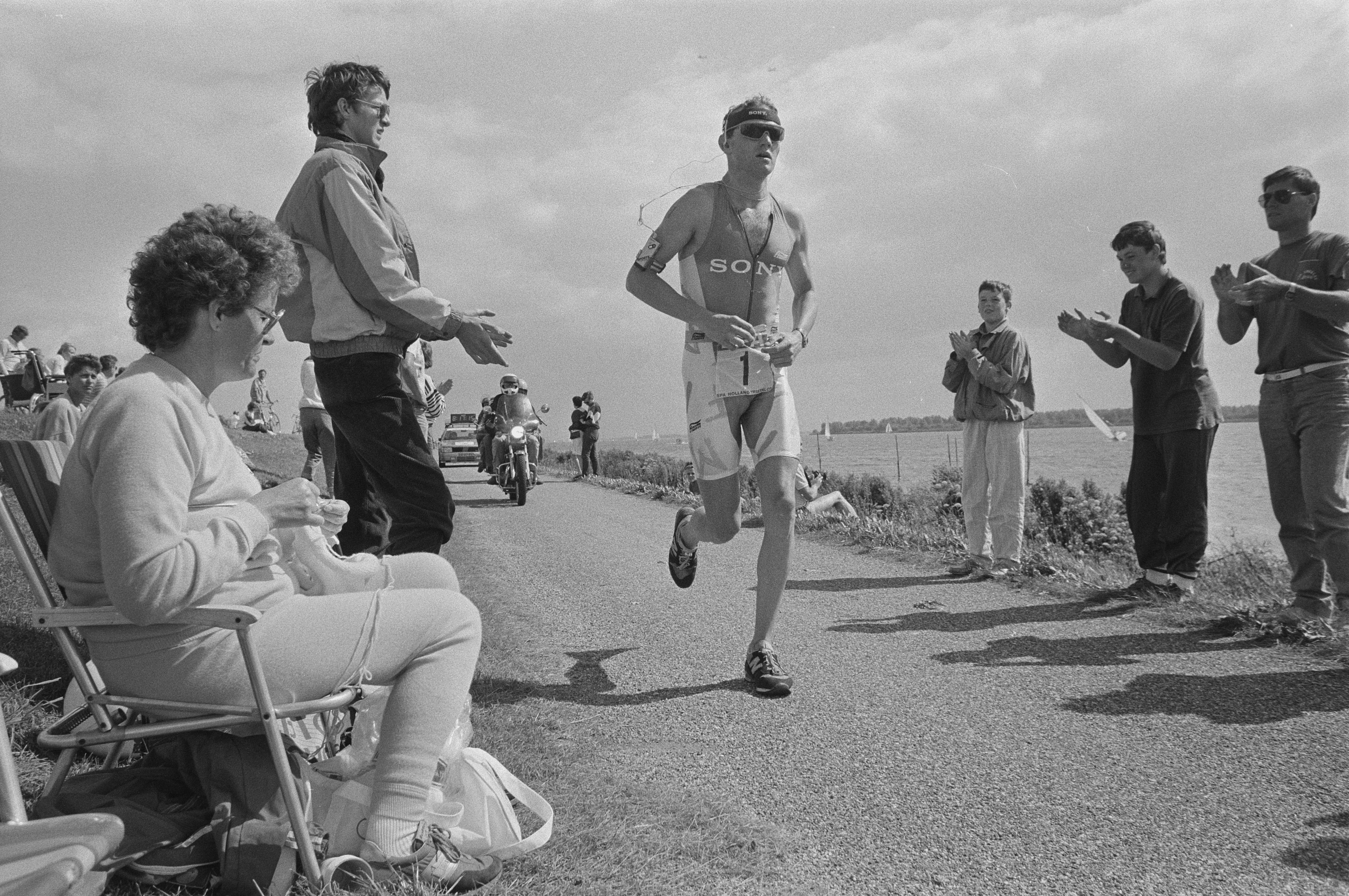 Collectie / Archief : Fotocollectie Anefo Reportage / Serie : [ onbekend ] Beschrijving : Triathlon in Almere; Axel Koenders tijdens de triathlon lopen Datum : 15 augustus 1987 Locatie : Almere, Flevoland Trefwoorden : triathlons Persoonsnaam : Axel Koenders Fotograaf : Molendijk, Bart / Anefo Auteursrechthebbende : Nationaal Archief Materiaalsoort : Negatief (zwart/wit) Nummer archiefinventaris : bekijk toegang 2.24.01.05 Bestanddeelnummer : 934-0509